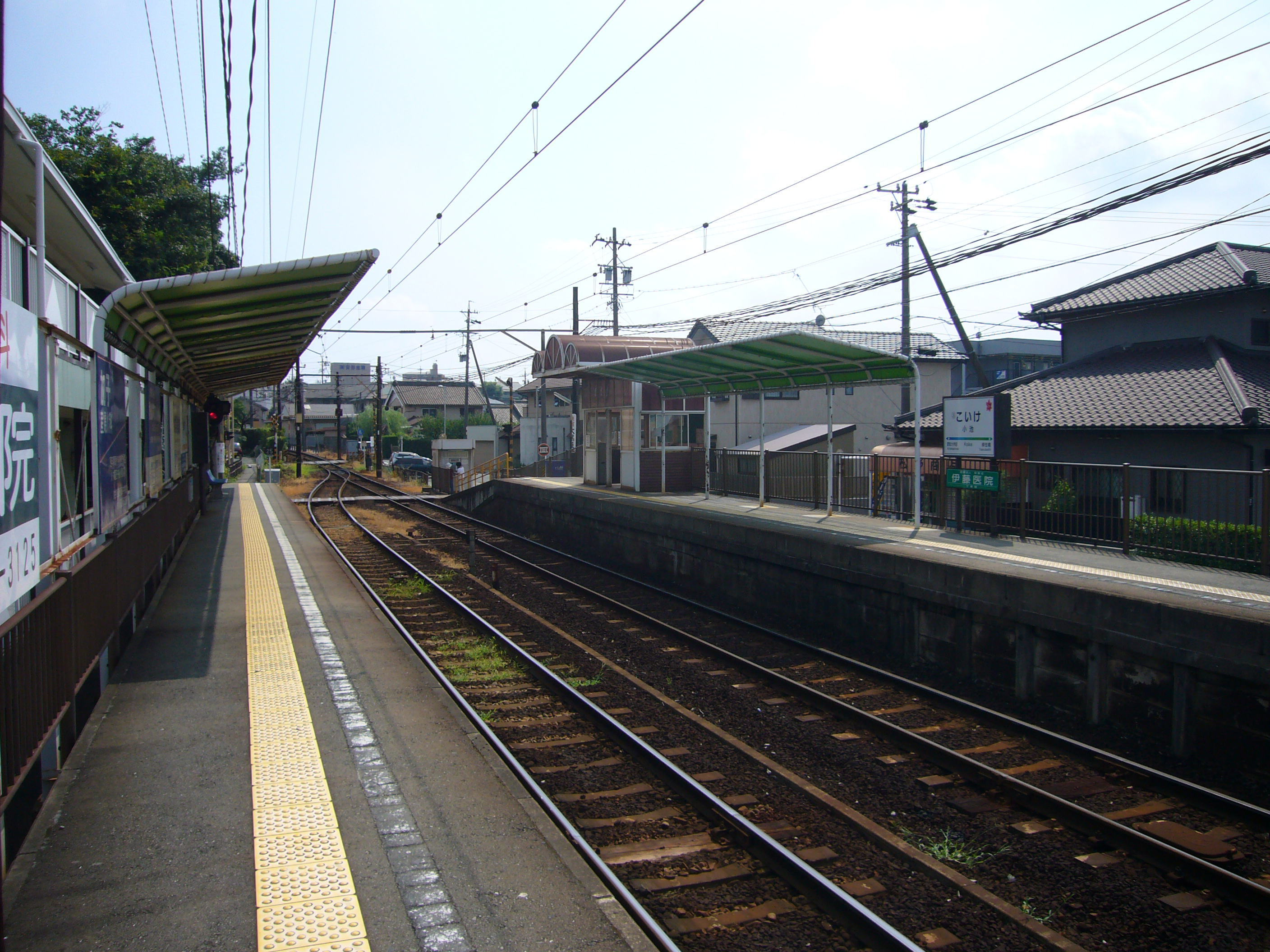 Koike Station, Toyohashi, Aichi, Japan